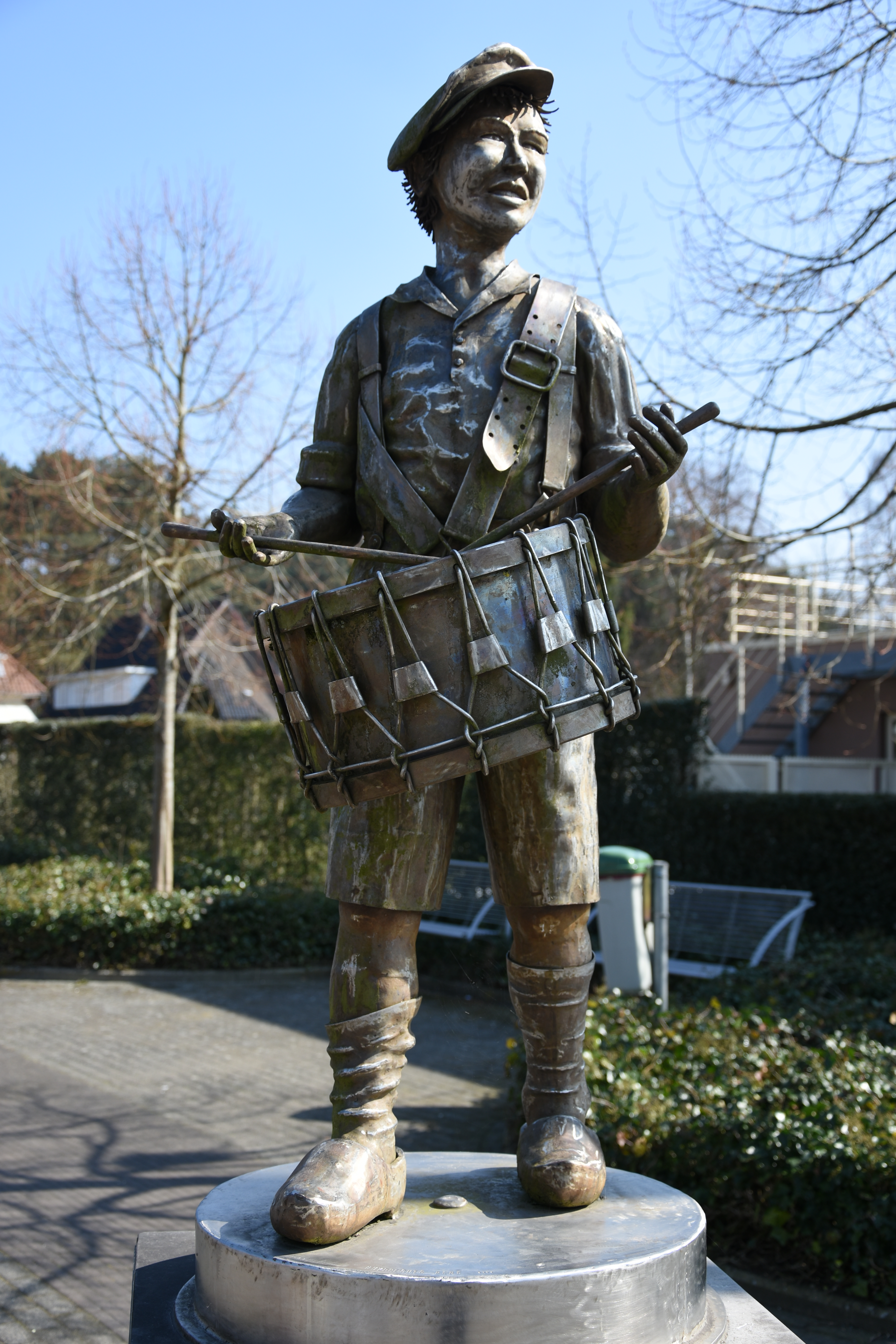 De Kleine Tamboer, te Averbode 175 x 87 x 78 cm, voorstellend Ernest Claes als tamboer van de fanfare De Sint-Jansvrienden te Averbode